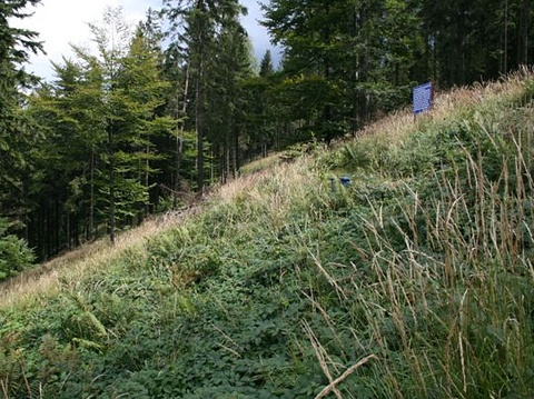 Leśny kościół w Jaworzu